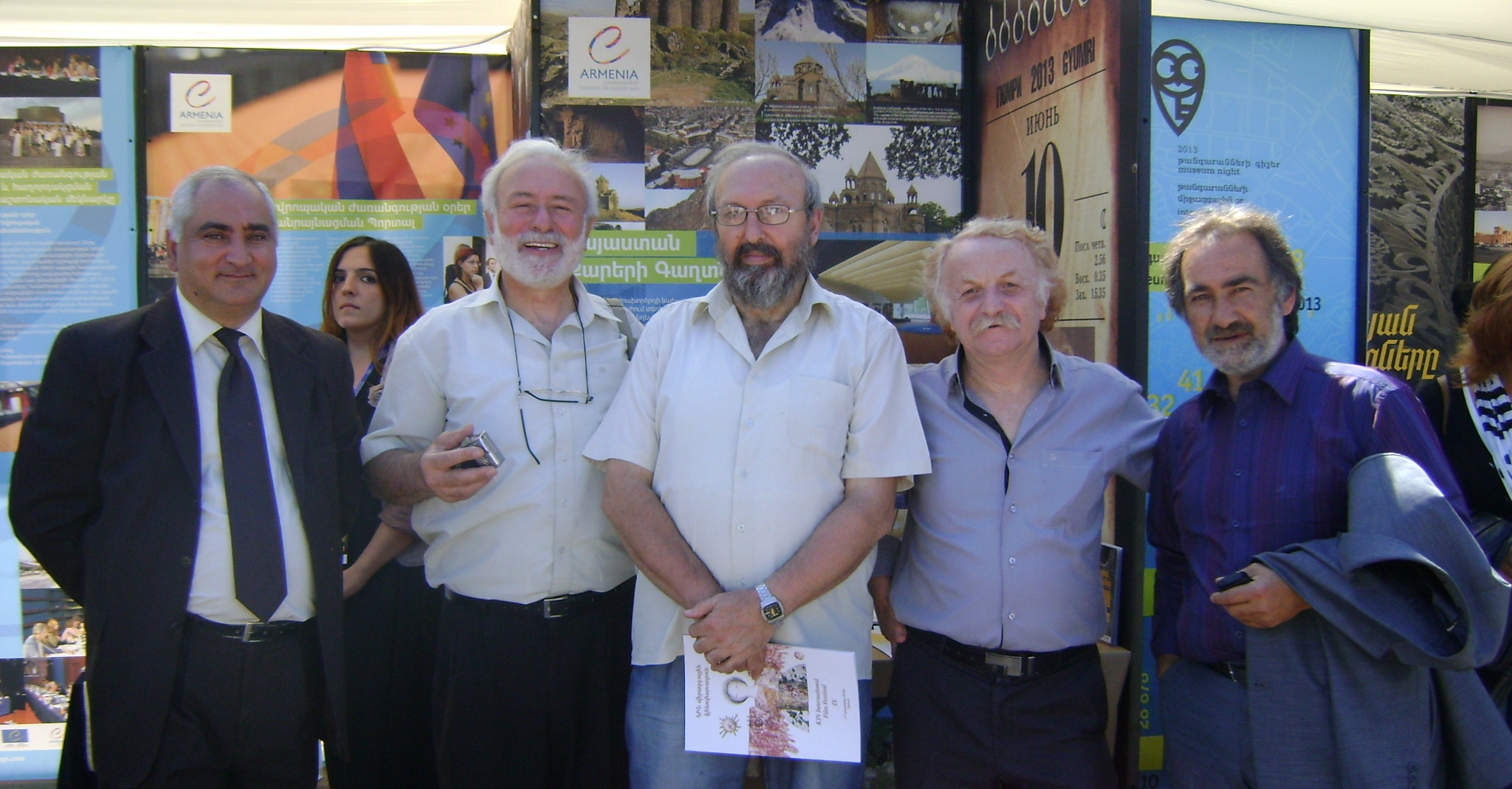 Արթ Էքսպո 2013, Գյումրի